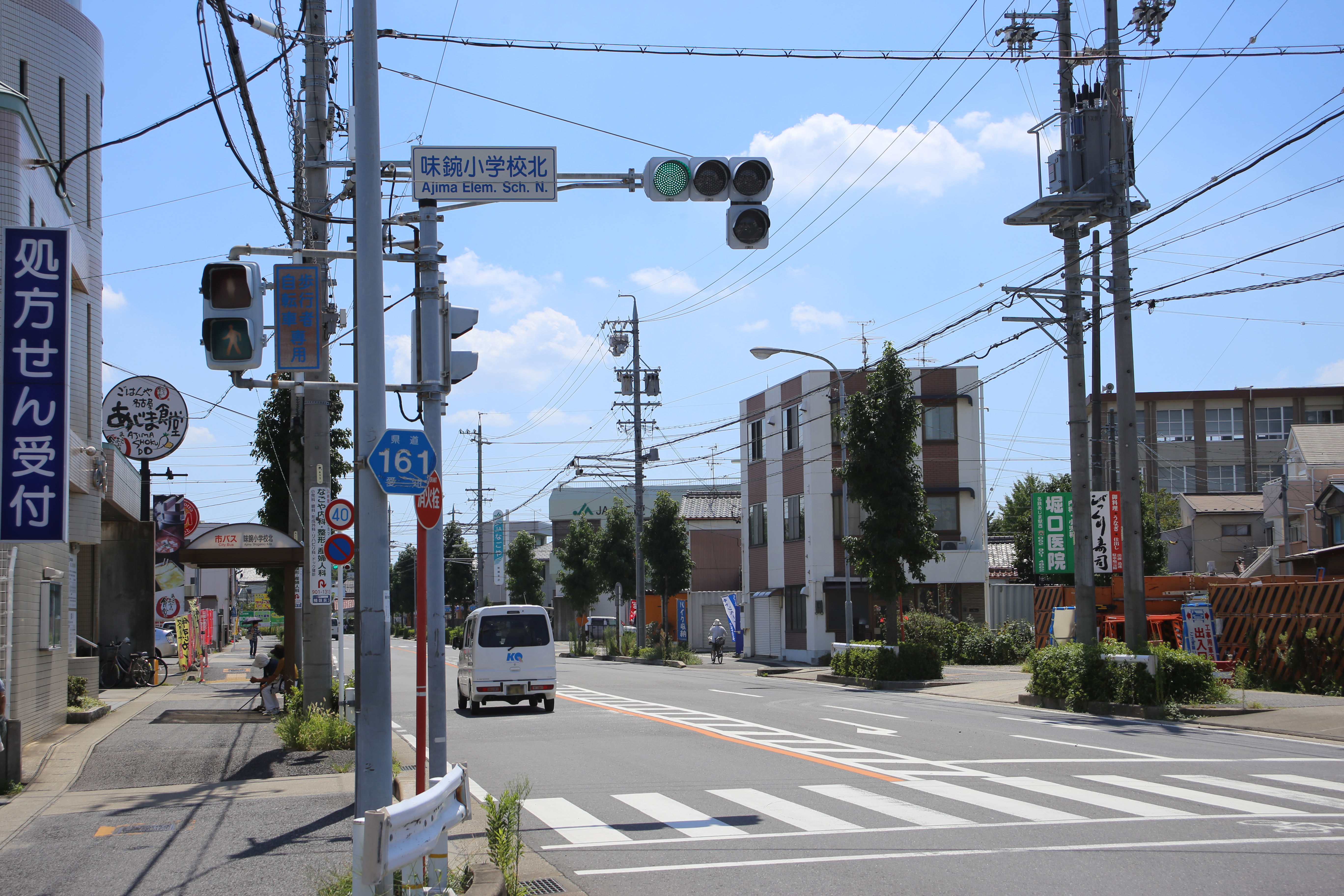 名古屋市北区の愛知県道161号味鋺小学校北交差点を北東側より撮影